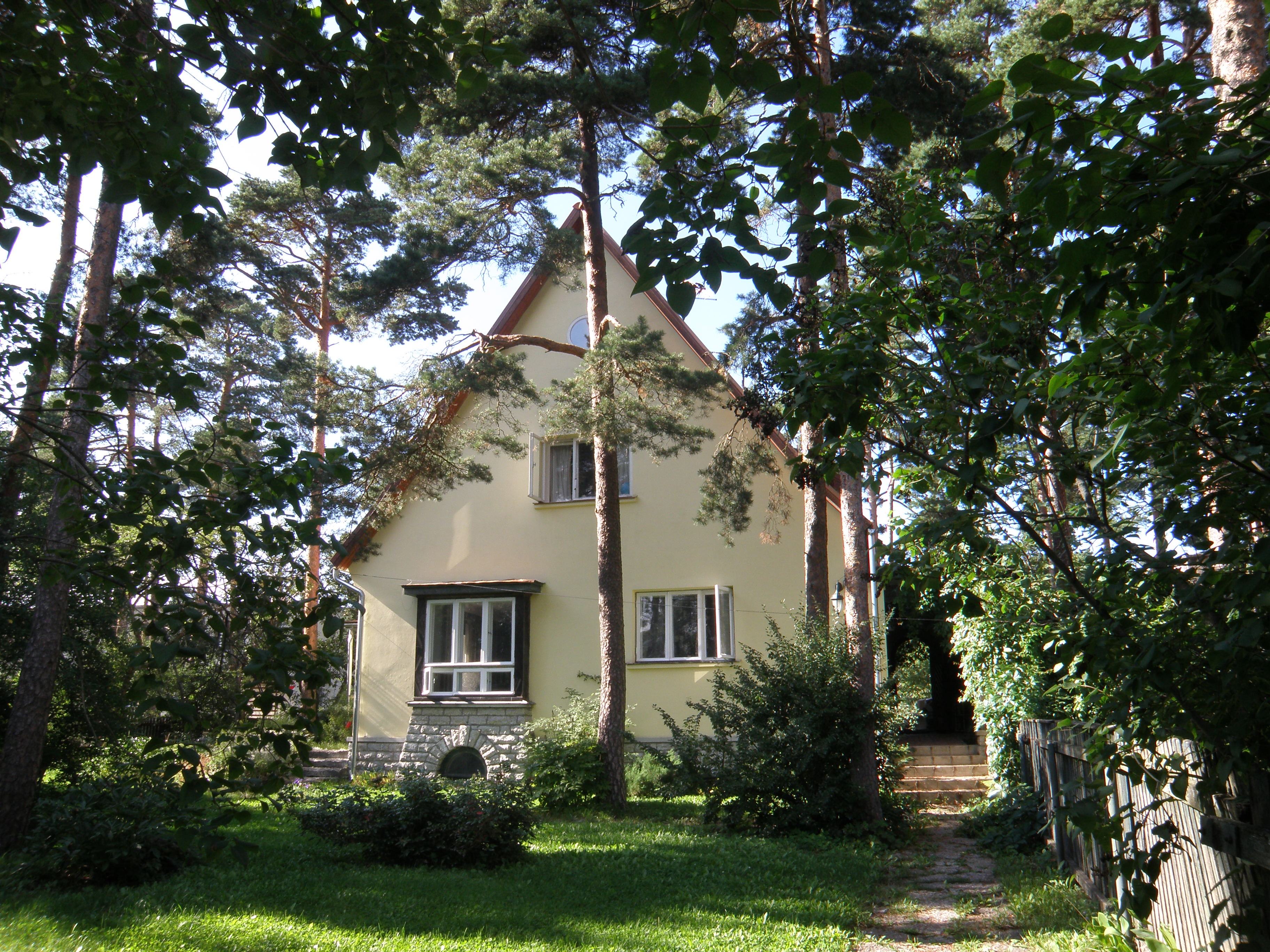 Elamu Vana-Pärnu mnt 15